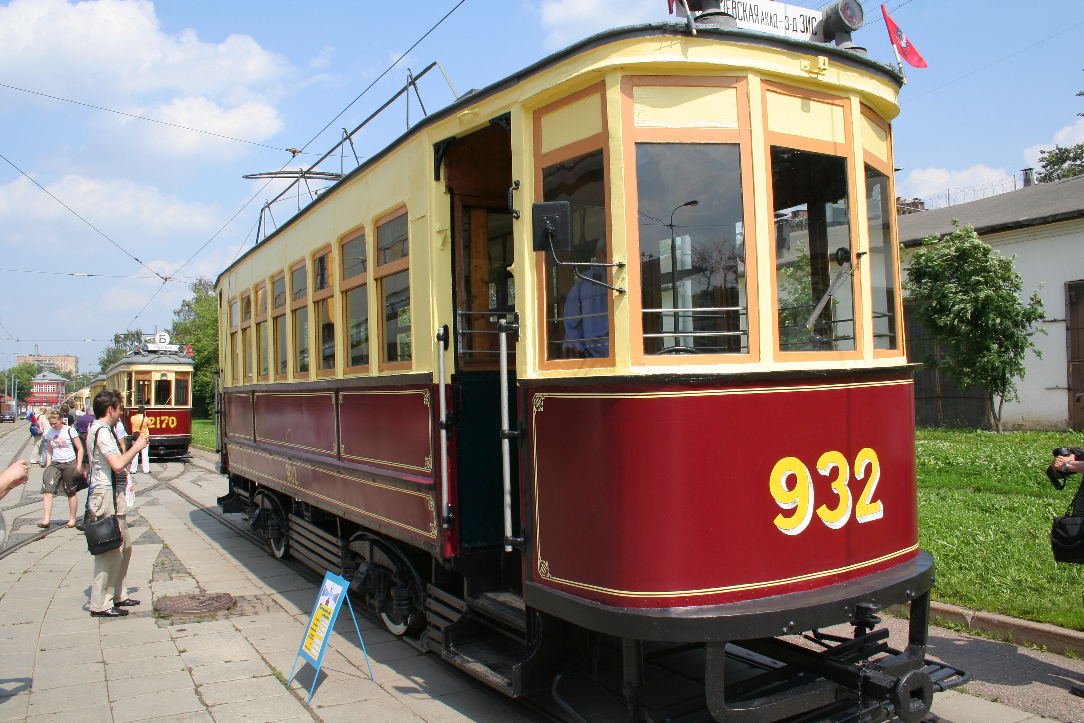 Ретро-трамвай Мосгортранса БФ Коломенского завода на показе около Депо им. Баумана 12 июня 2010 года.